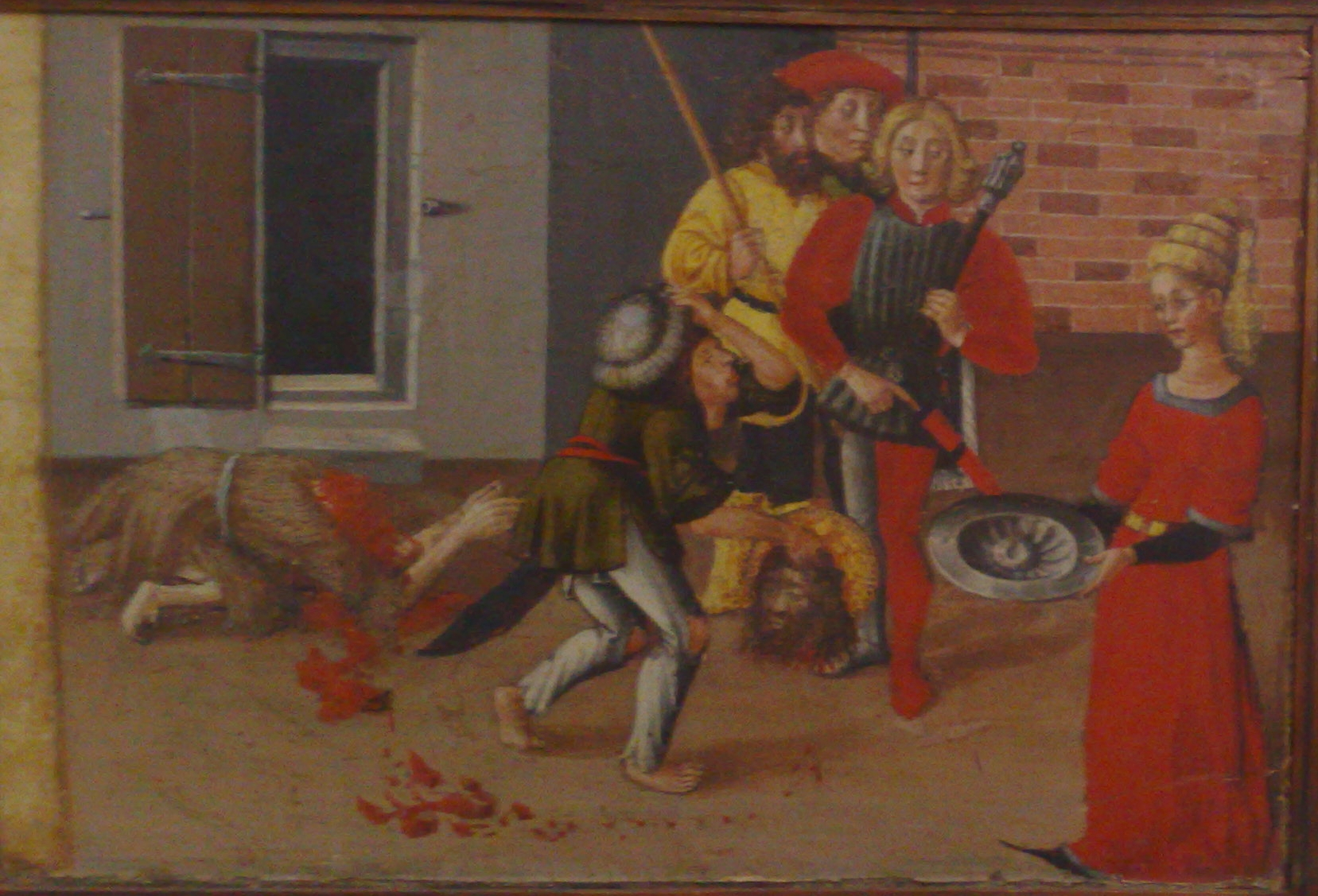 Détail du retable Saint Jean-Baptiste (provenant de l'église de Lucéram) par Jacques Durandi - Musée des Beaux-Arts de Nice